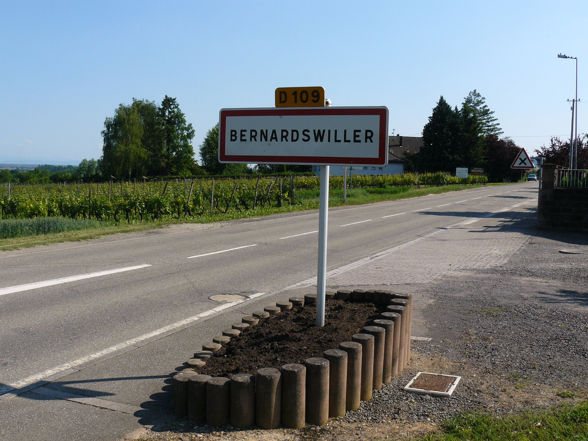 Entrée du village de Bernardswiller